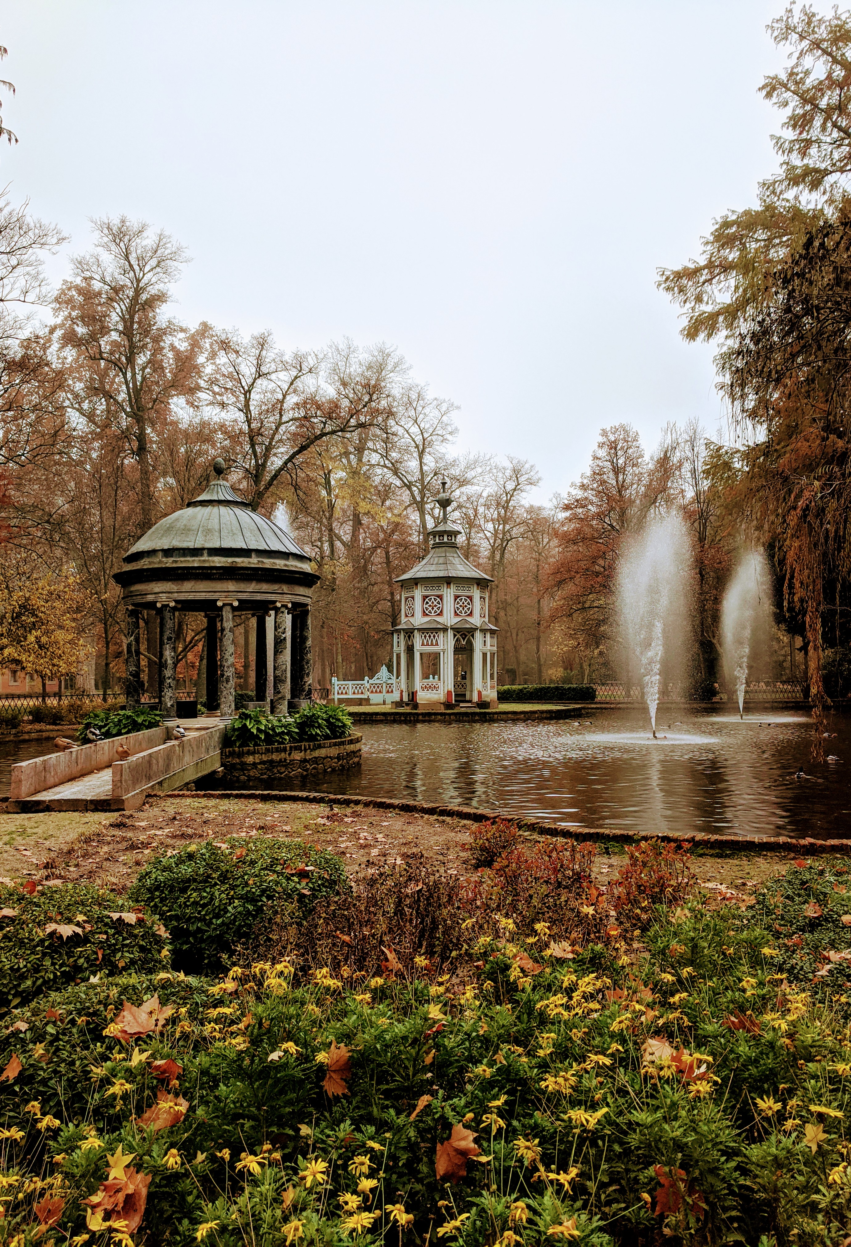 Estanque de los Chinescos en otoño, en el jardín del Príncipe (Aranjuez, España).